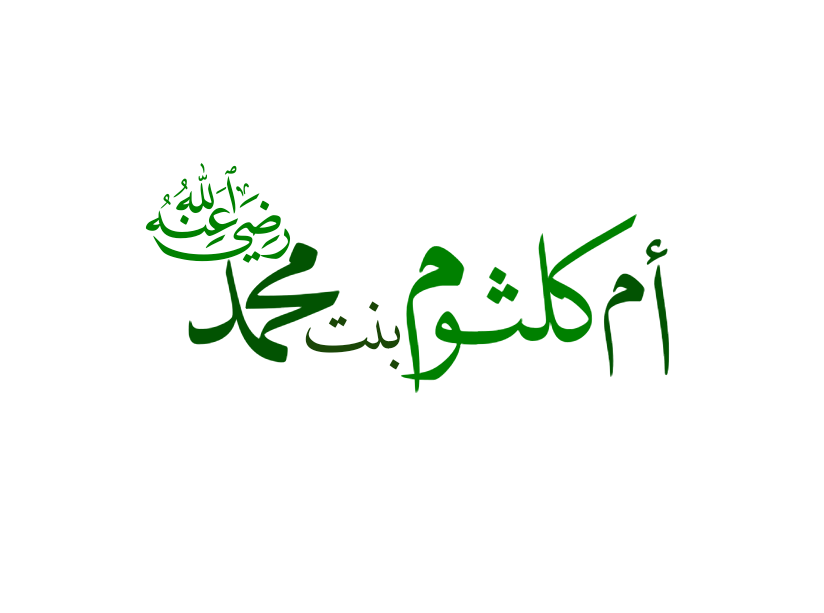 أم كلثوم بنت محمد اسم الخط